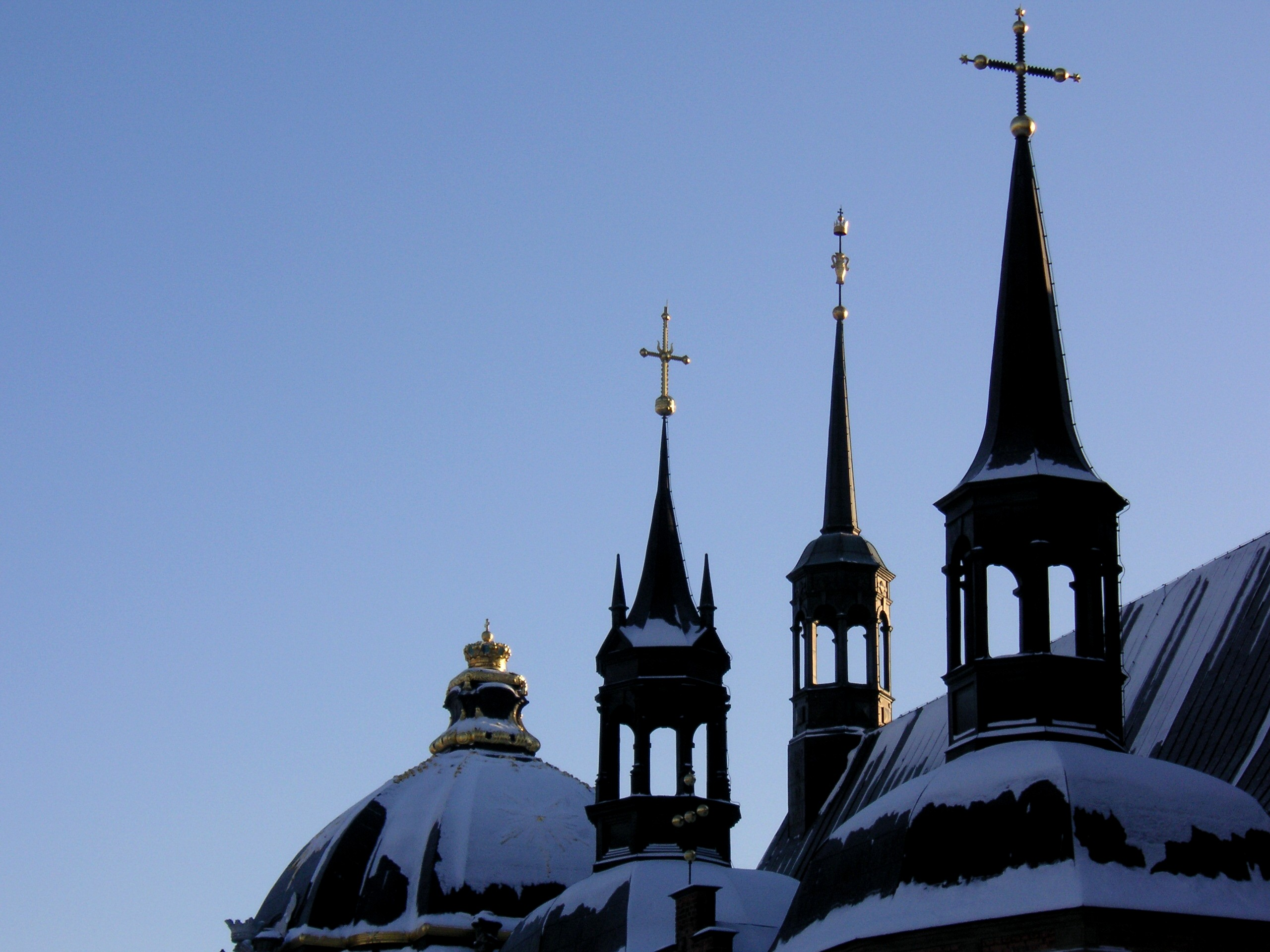 Die Turmspitzen der Riddarholmskyran in Sockholm